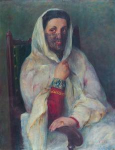 "Ritratto di donna velata" 1947, 74x57 olio su tela. opera esposta presso Eco Art Hotel di Torino.